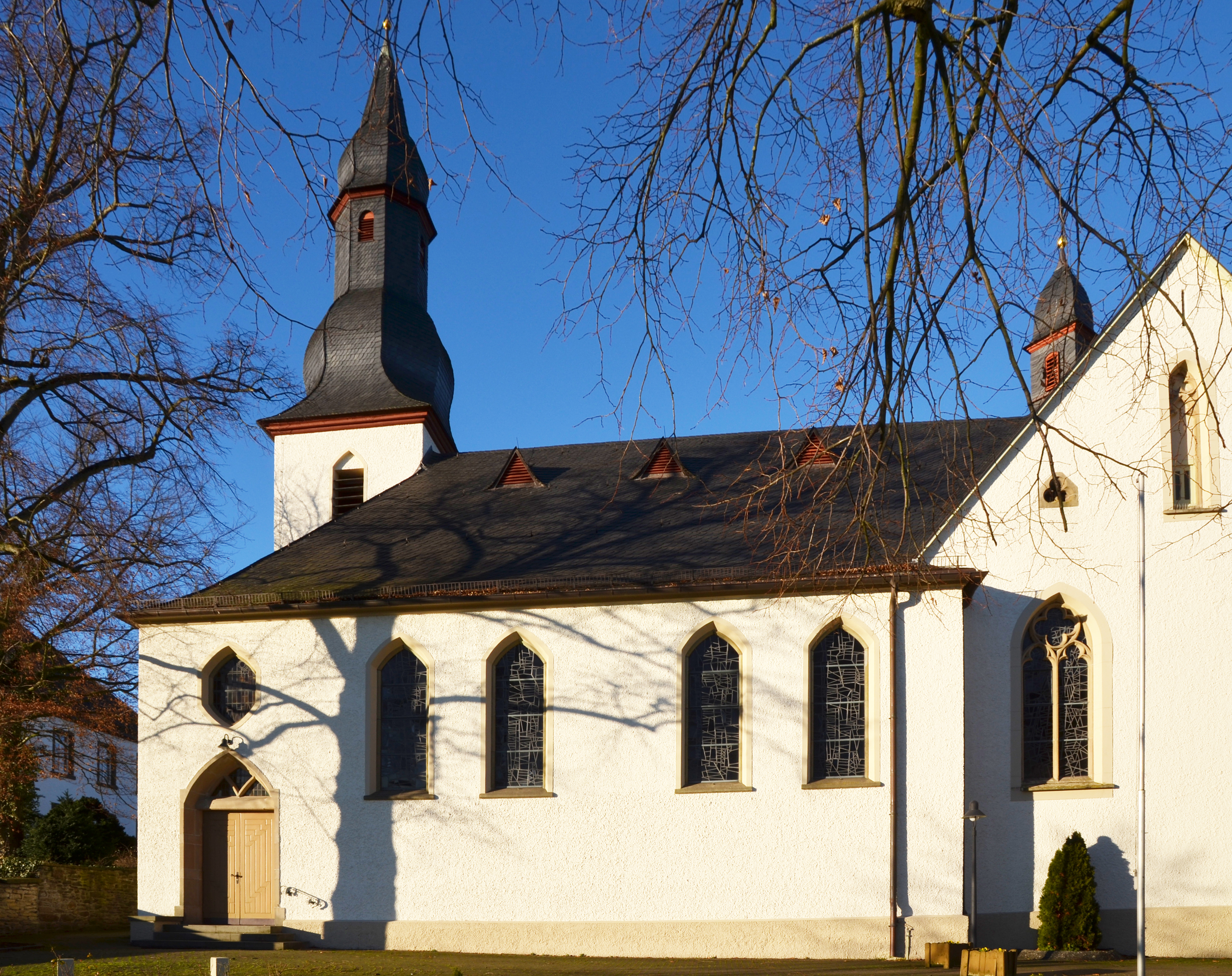 St. Antoniuskirche in Möhnesee-Günne, Außenansicht